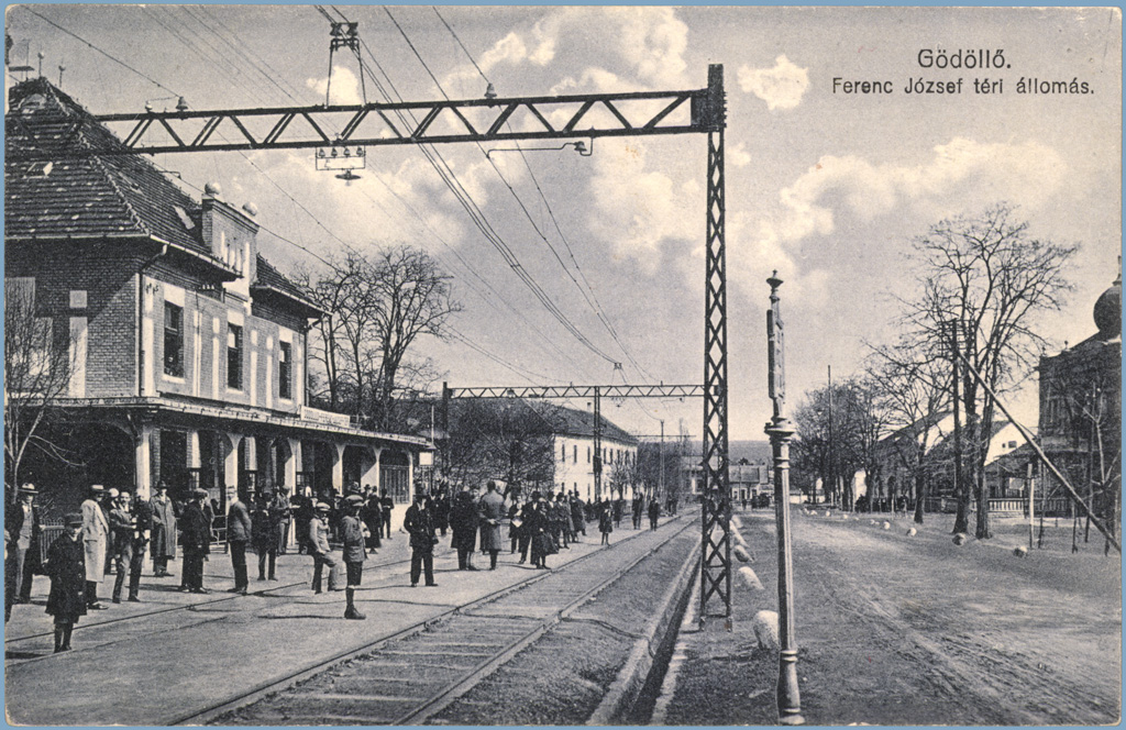 A gödöllői Ferenc József téri HÉV-állomás képeslapon az 1920-as évekből